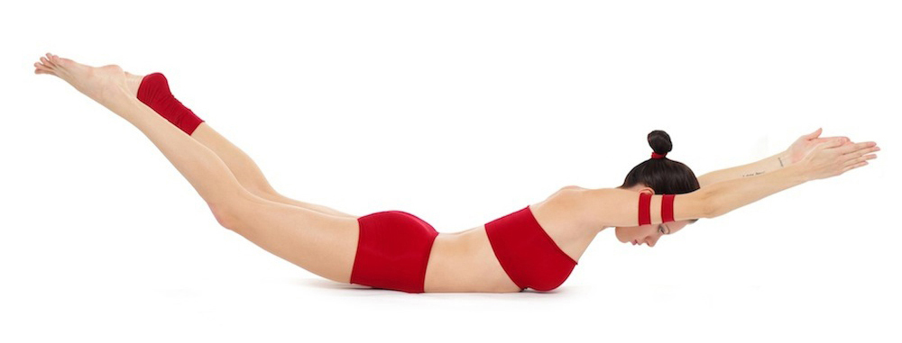 Salabhasana by Nina Mel, Yoga Teacher